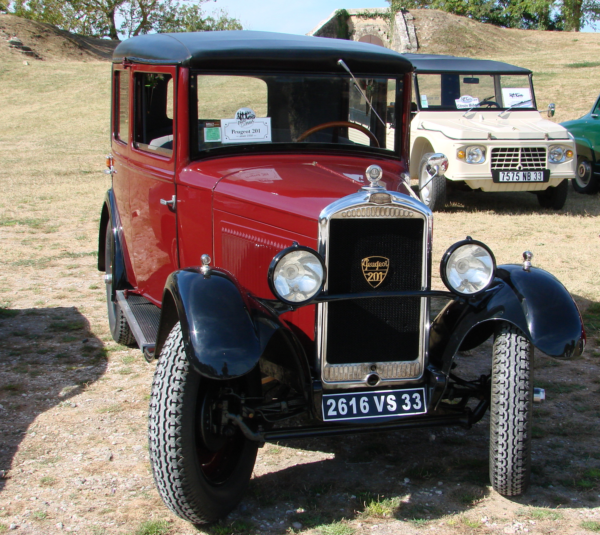 Peugeot 201 aux journées du patrimoine 2012 à Blaye